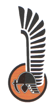 波蘭第一裝甲師的標誌